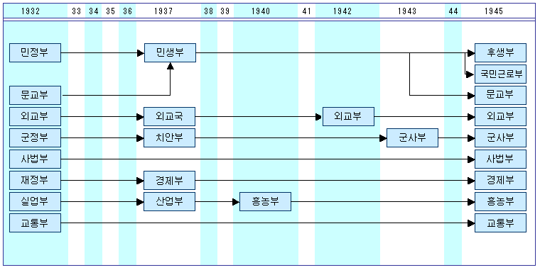 만주국 국무원 각부의 변천과정